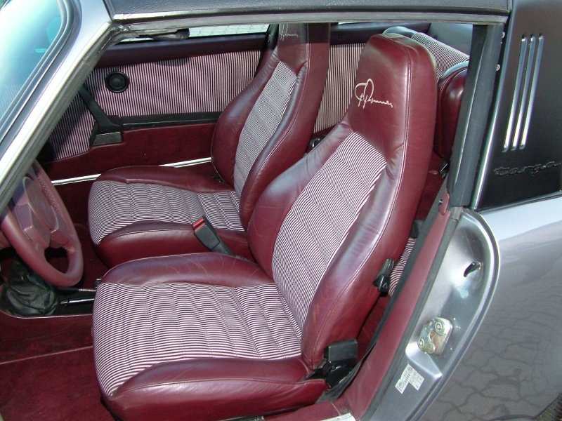 911 SC Jubimodell 1981 Innenraum